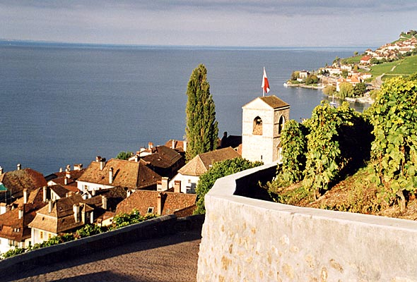 Saint-Saphorin (Lavaux) am Genfersee.